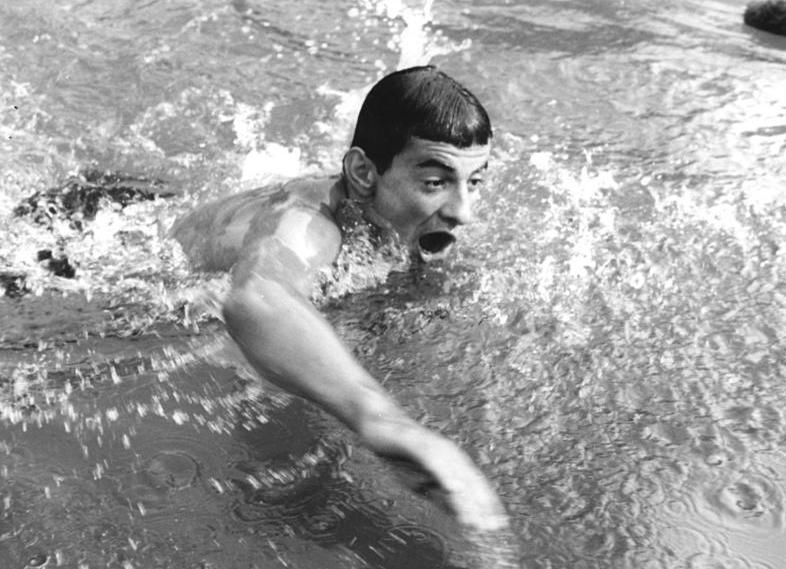 Karl-Heinz Kutschke Zentralbild Biscan 11.8.1958 II. Deutsche Schwimm- Meisterschaften 1958 Vom 7. bis 10.8.1958 fanden in Halberstadt die 2. Deutsche Schwimm-Meisterschaften 1958 statt. UBz: Über 1500-m-Freistil wurde Karl-Heinz Kutschke (Sc Einheit Berlin) Deutscher Meister.